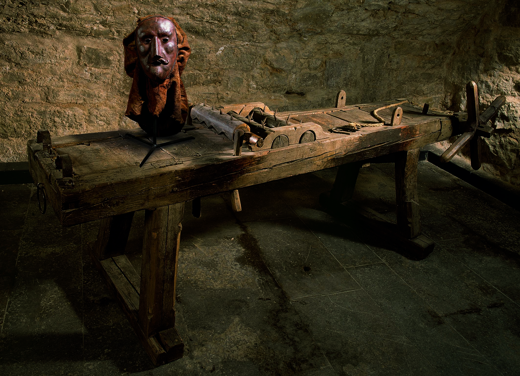 Streckbank im Kriminalmuseum